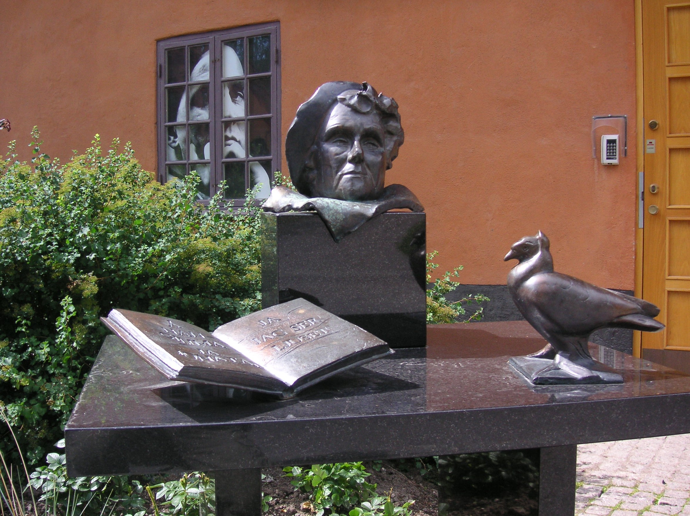 Skulptur i Filmstaden, Solna, "Mitt möte med Astrid Lindgren" av Herta Hillfon 2003